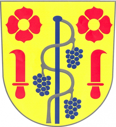 znak obce Radotín